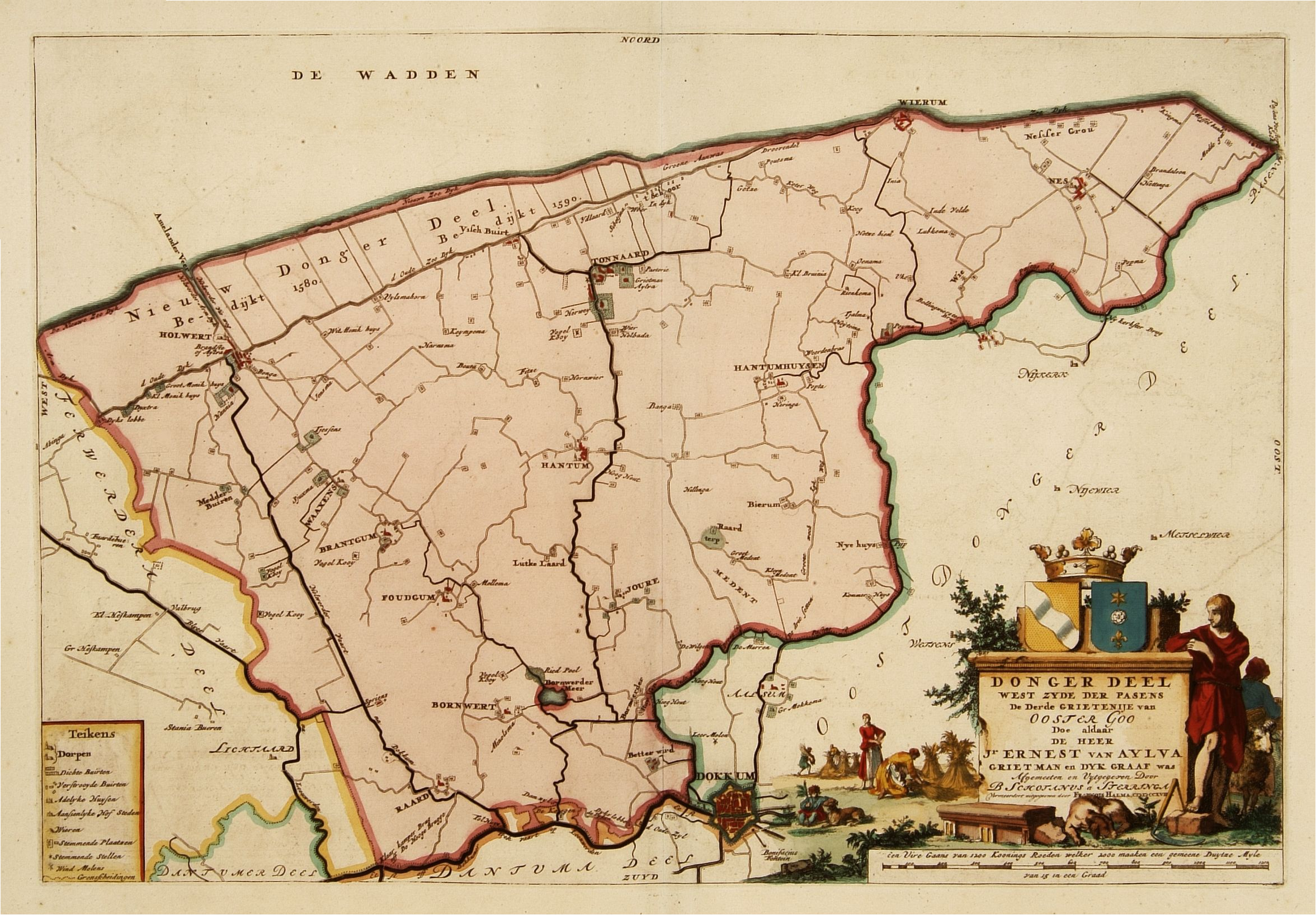 DONGER DEEL, WEST ZYDE DER PASENS, De Derde GRIETENIJE van Ooster Goo, Doe aldaar DE HEER Jr ERNEST VAN AYLVA. GRIETMAN en DYK GRAAF was. Afgemeeten en uytgegeven Door B. Schotanus a Sterringa, vermeerdert uitgegeven door Francois Halma, MDCCXVIII